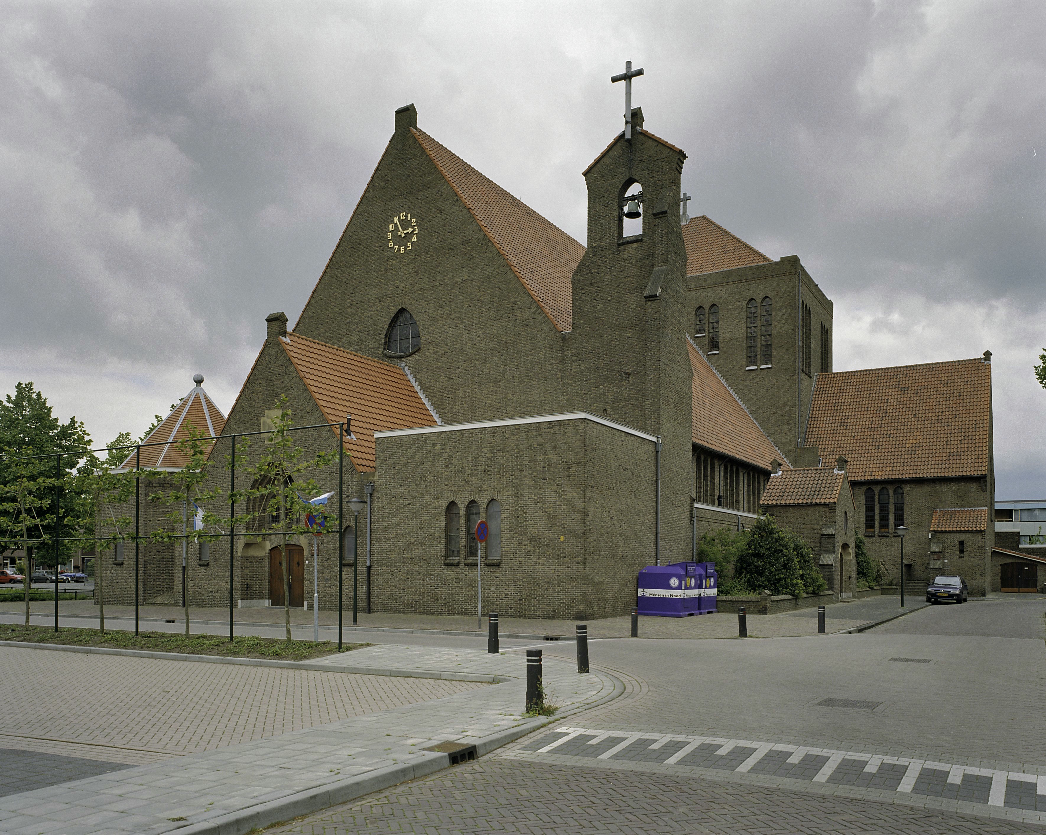 Kerkcomplex: kerk en pastorie: Overzicht westgevel